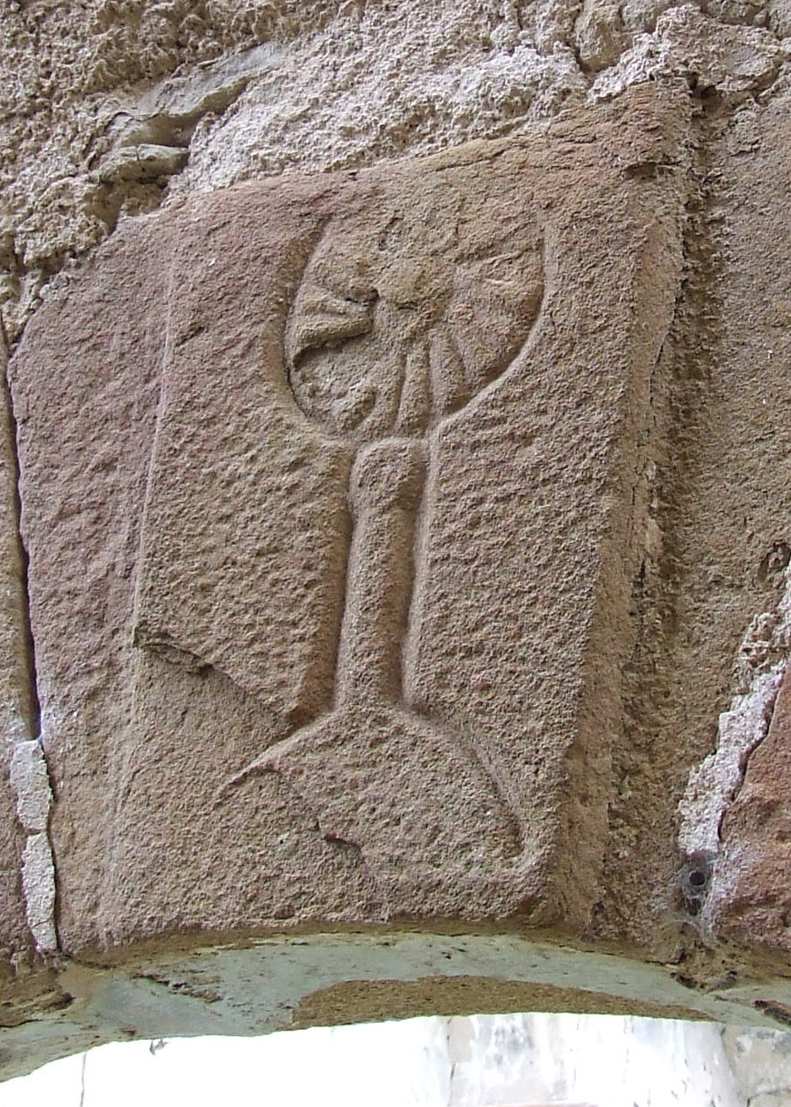 Imatge sagramental a la llinda de l'església (Sant Esteve de la Sarga, Pallars Jussà)